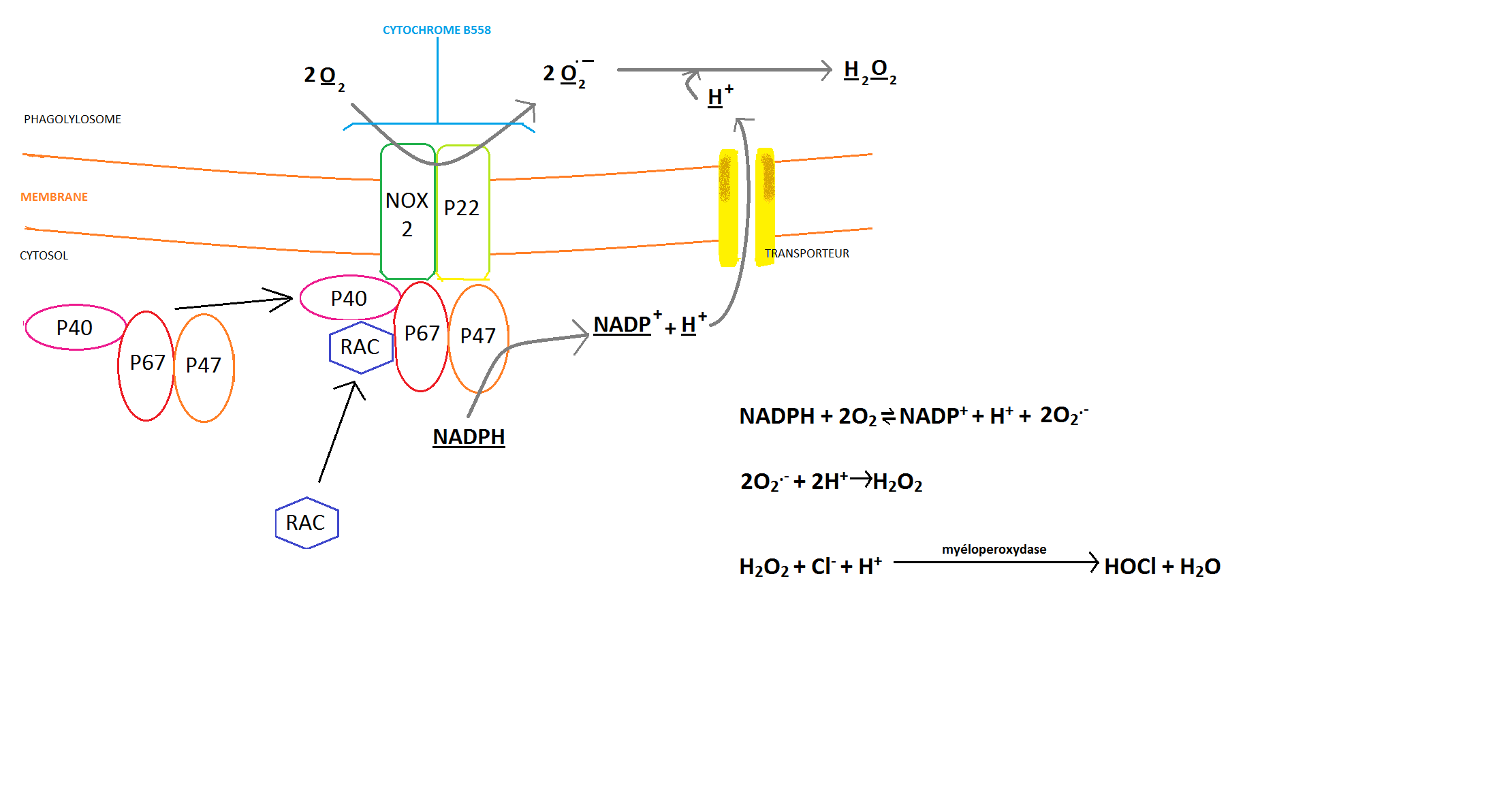 Schéma récapitulatif de la NADPH Oxydase